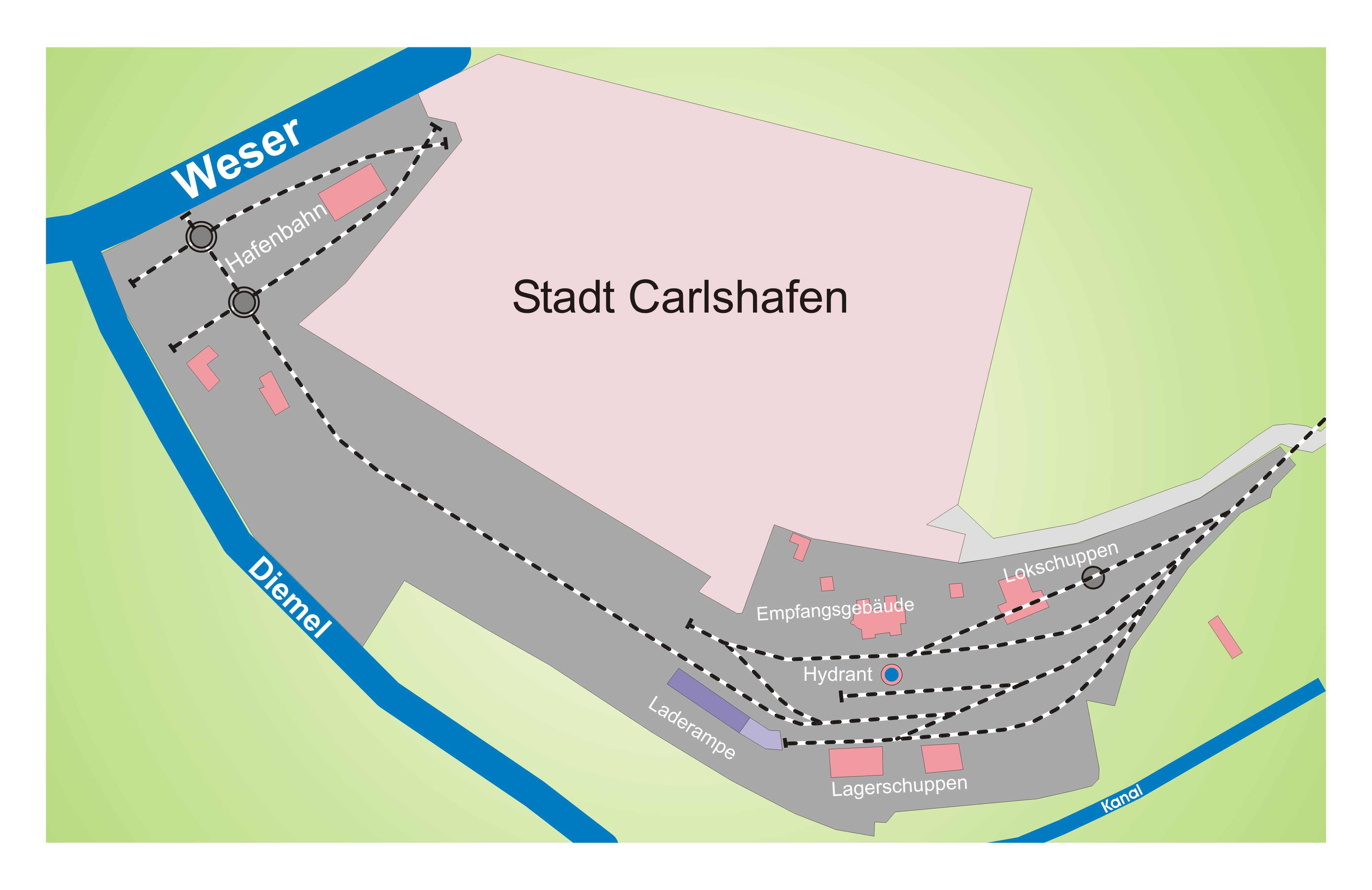 Gleisplan des Bahnhofs "Carlshafen linkes Ufer" 1912-1966 - selbst erstellt Feb. 2006 - Vorlage: Plan KED Kassel